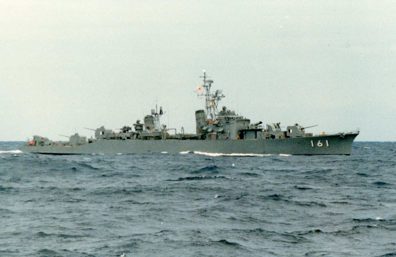 護衛艦あきづき（時期不明）